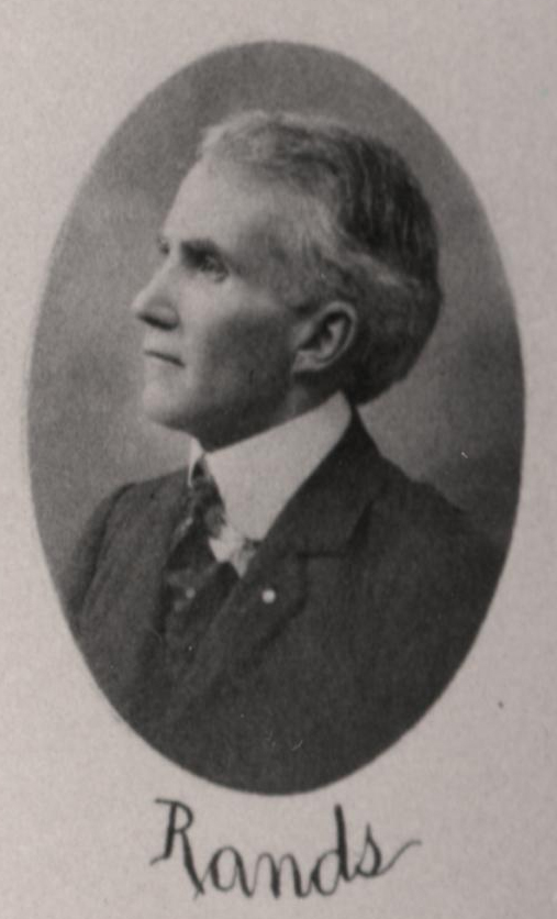 Sen EM Rands